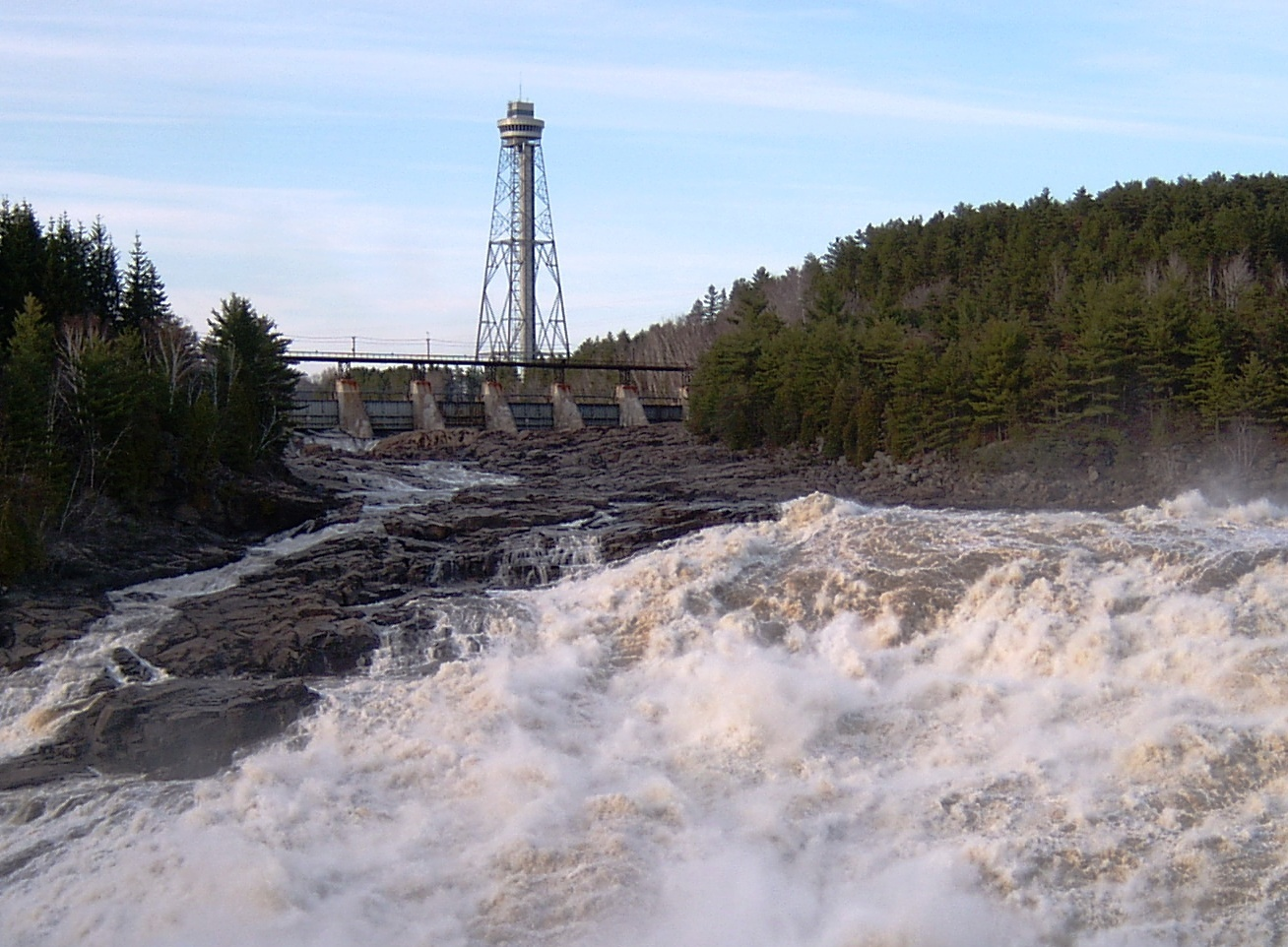 Une partie des chutes de Shawinigan avant le bassin, lorsque le barrage sur un bras de la rivière est ouvert et le barrage sur l'autre bras est fermé. La tour fait partie des installations thématiques de la Cité de l'énergie.